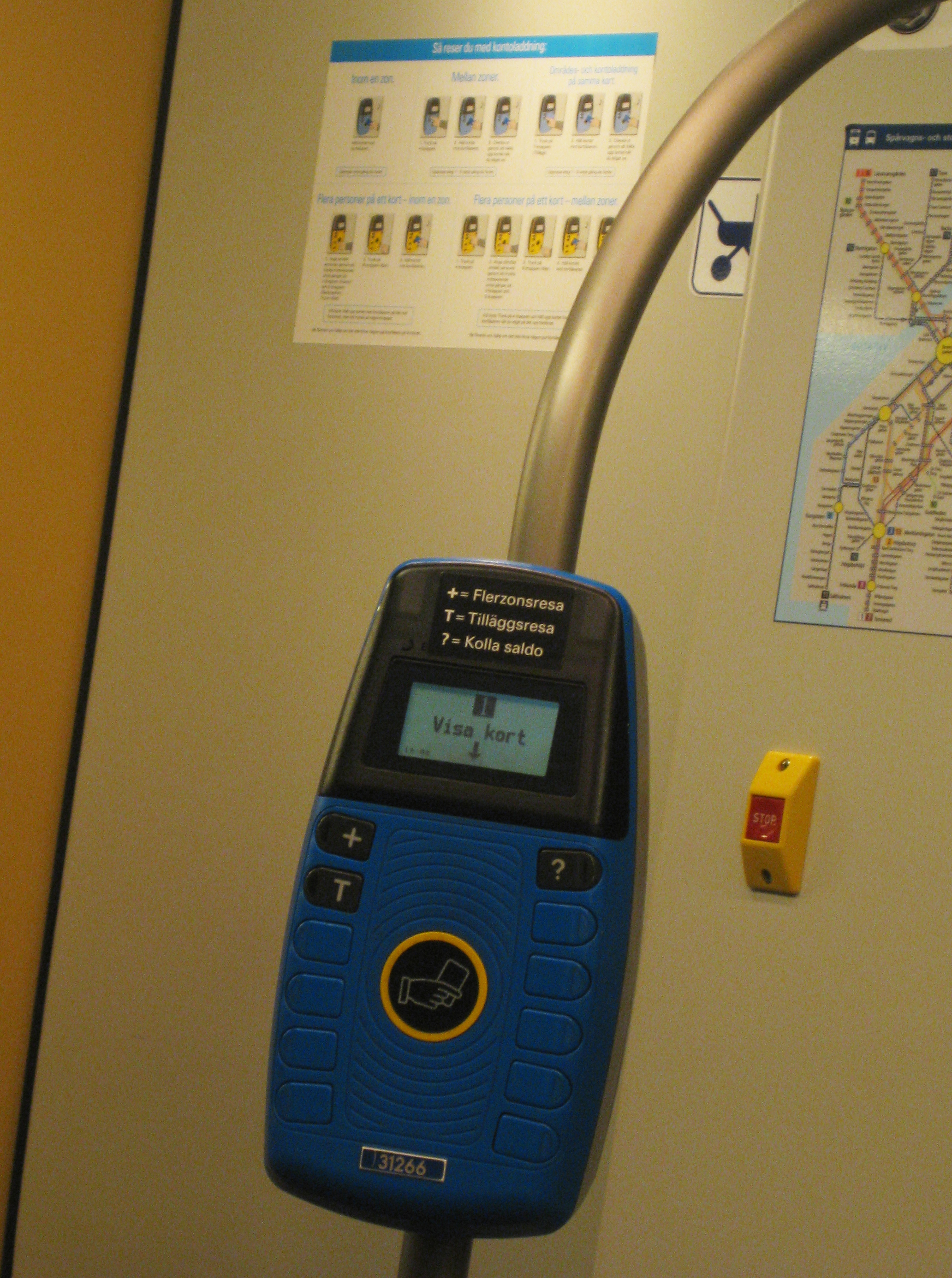 Biljettautomat med instruktioner på väggen bakom.